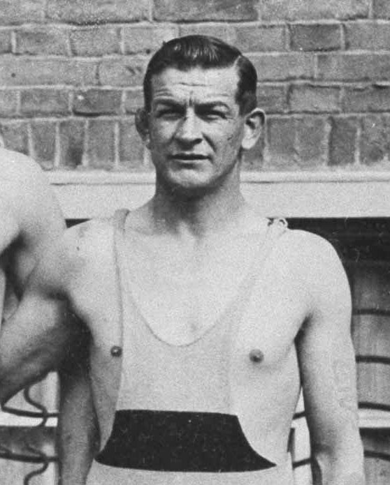 Eric Malmberg